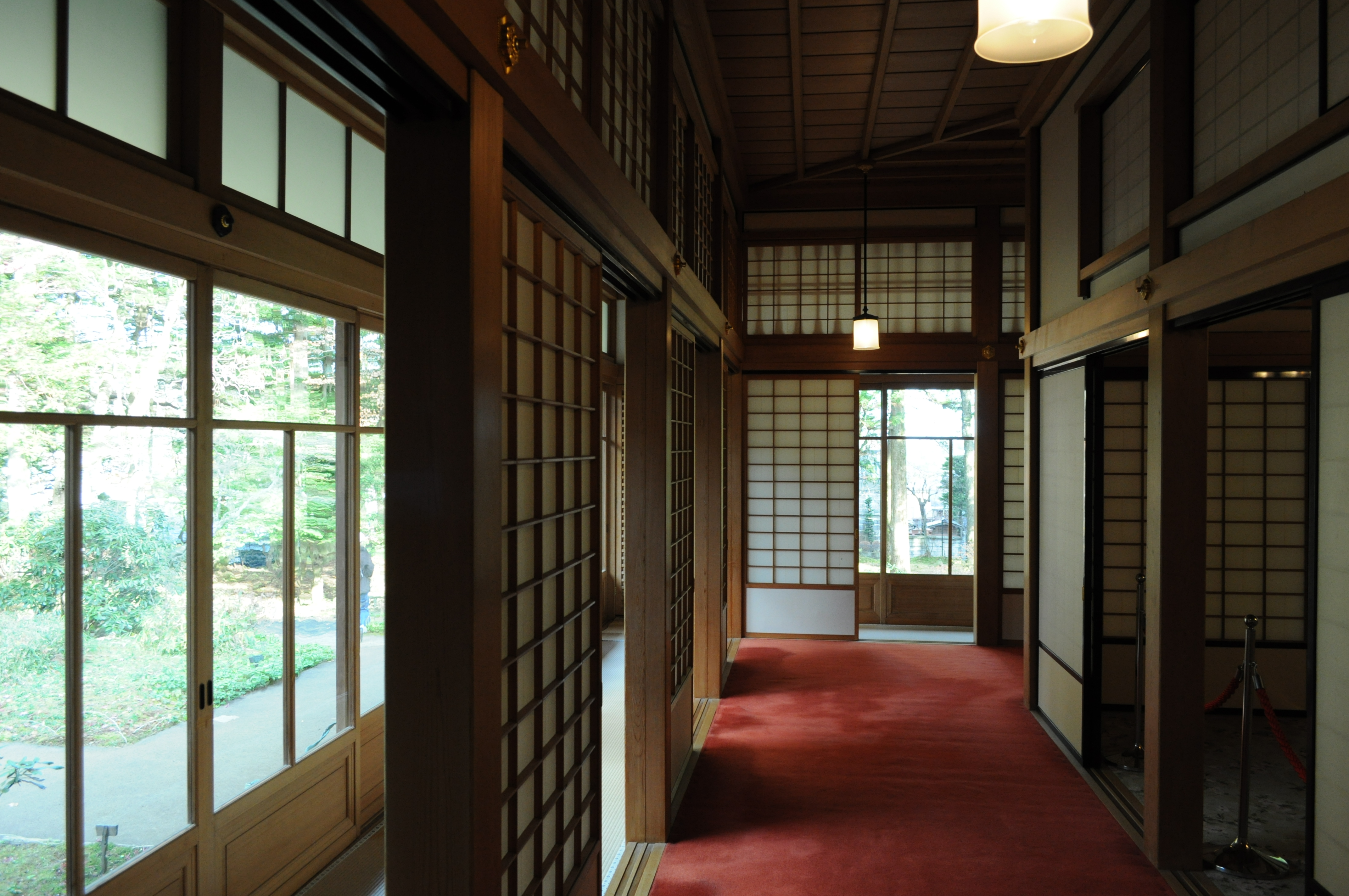 日光田母沢御用邸記念公園